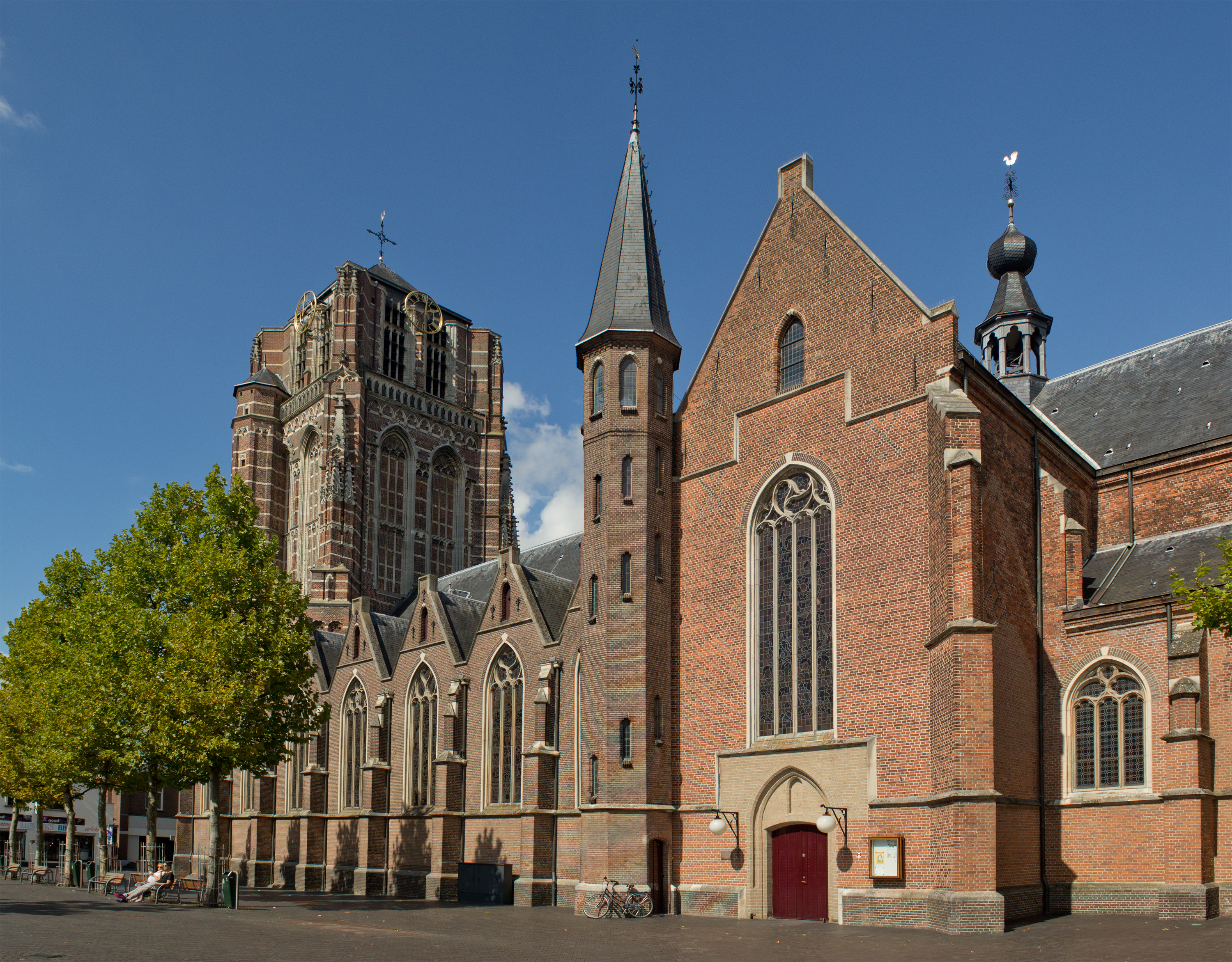 Oosterhout, Sint-Jansbasiliek